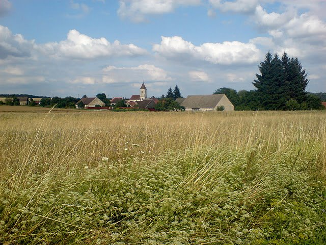 Chvalatice